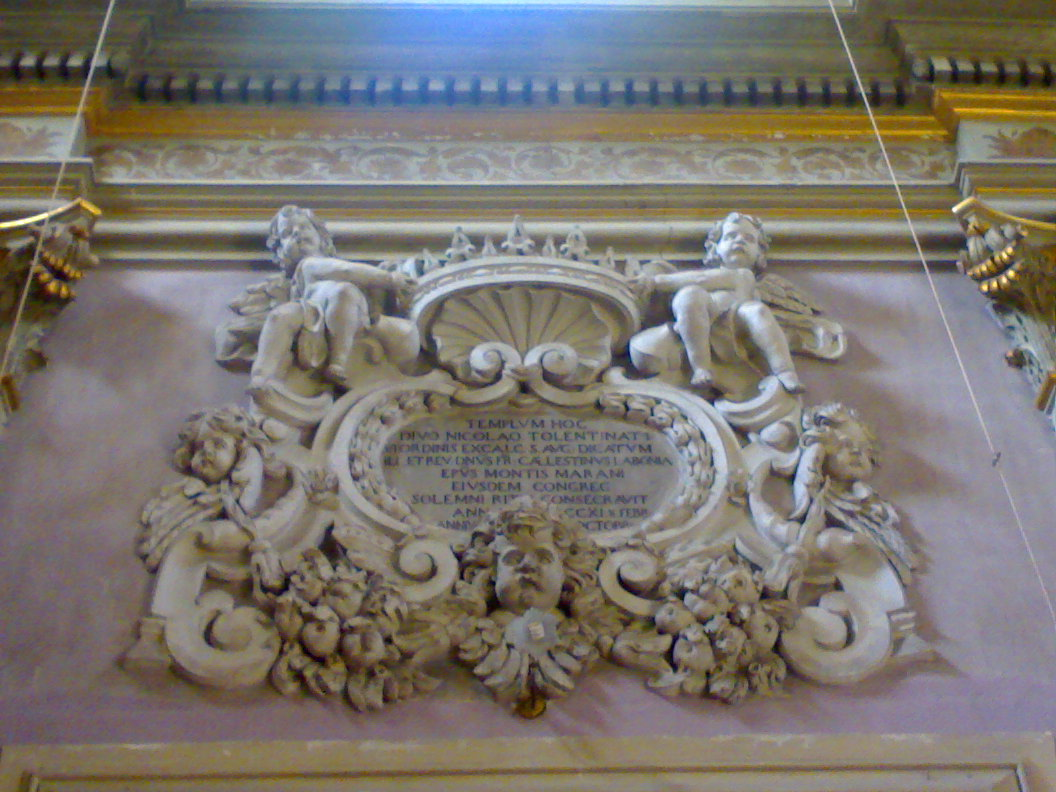 Chiesa di San Nicola da Tolentino (Napoli, particolare di un complesso scultoreo)